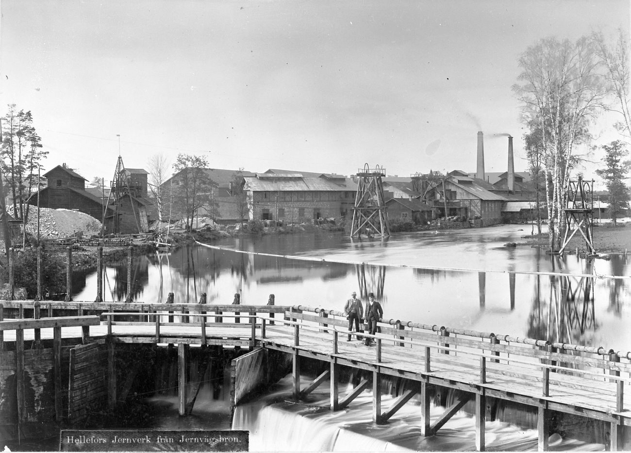 B14443. Järnverket, Hellefors Bruks AB, sett från järnvägsbron. Fotografiet är skänkt till Tekniska museet från Svenska Turistföreningen.